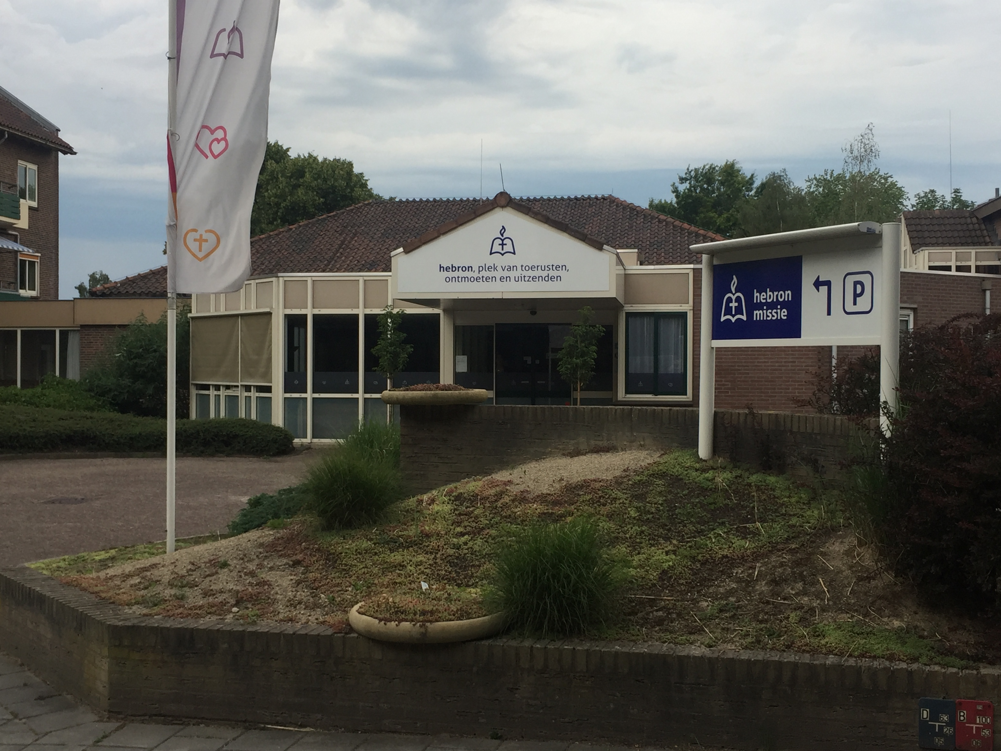 Het voormalige Zendingshuis in Amerongen. Het huis was van 1935 tot 2017 in handen van de Gemeenschap van Zendings-Diaconessen in Nederland. In 1985 werd het oude pand gesloopt en vond er nieuwbouw plaats. Het pand werd verkocht aan Stichting Heart Cry van de reformatorische evangelist Arjen Baan.